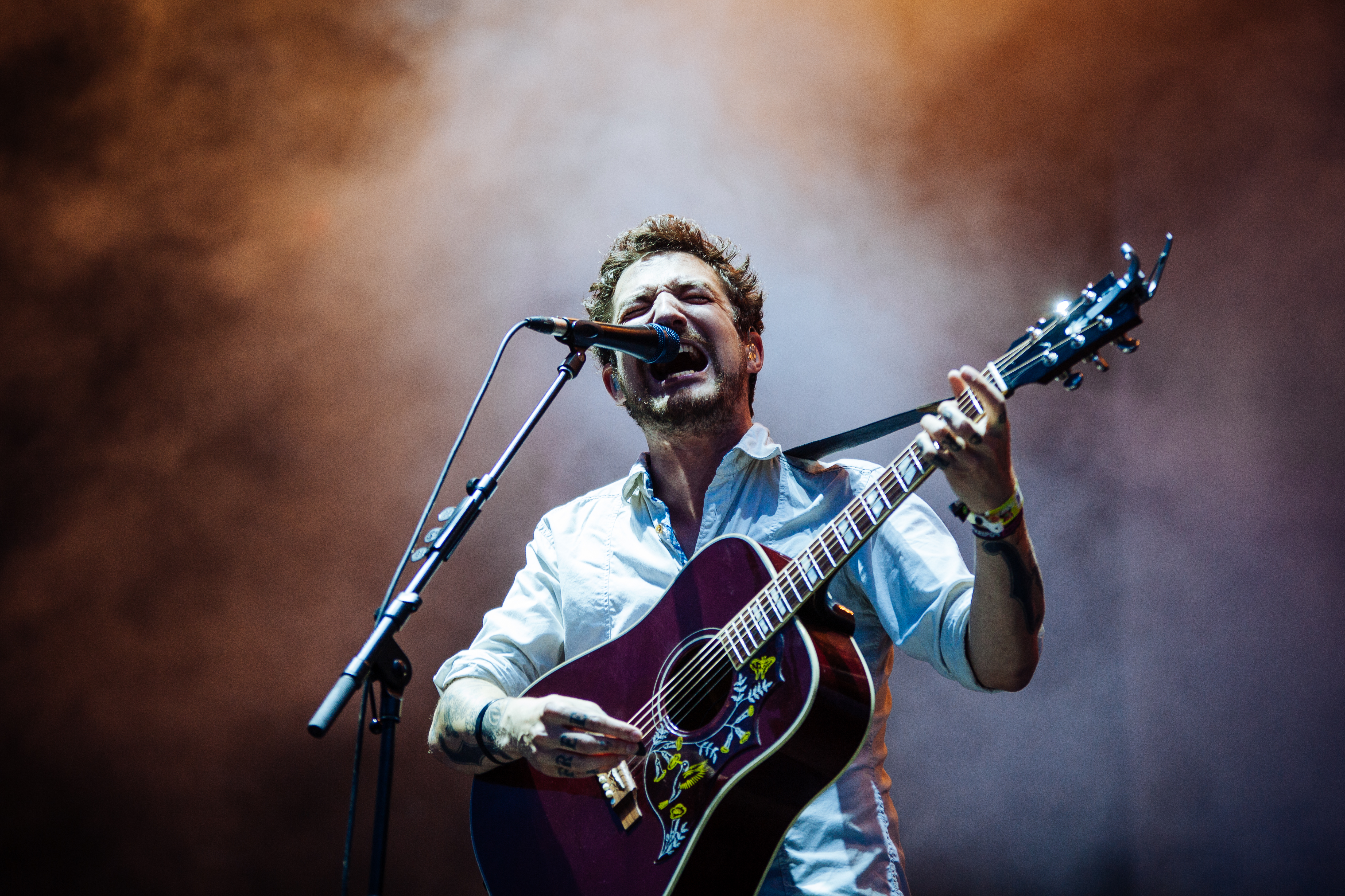 Frank Turner auf dem Highfield Festival 2014